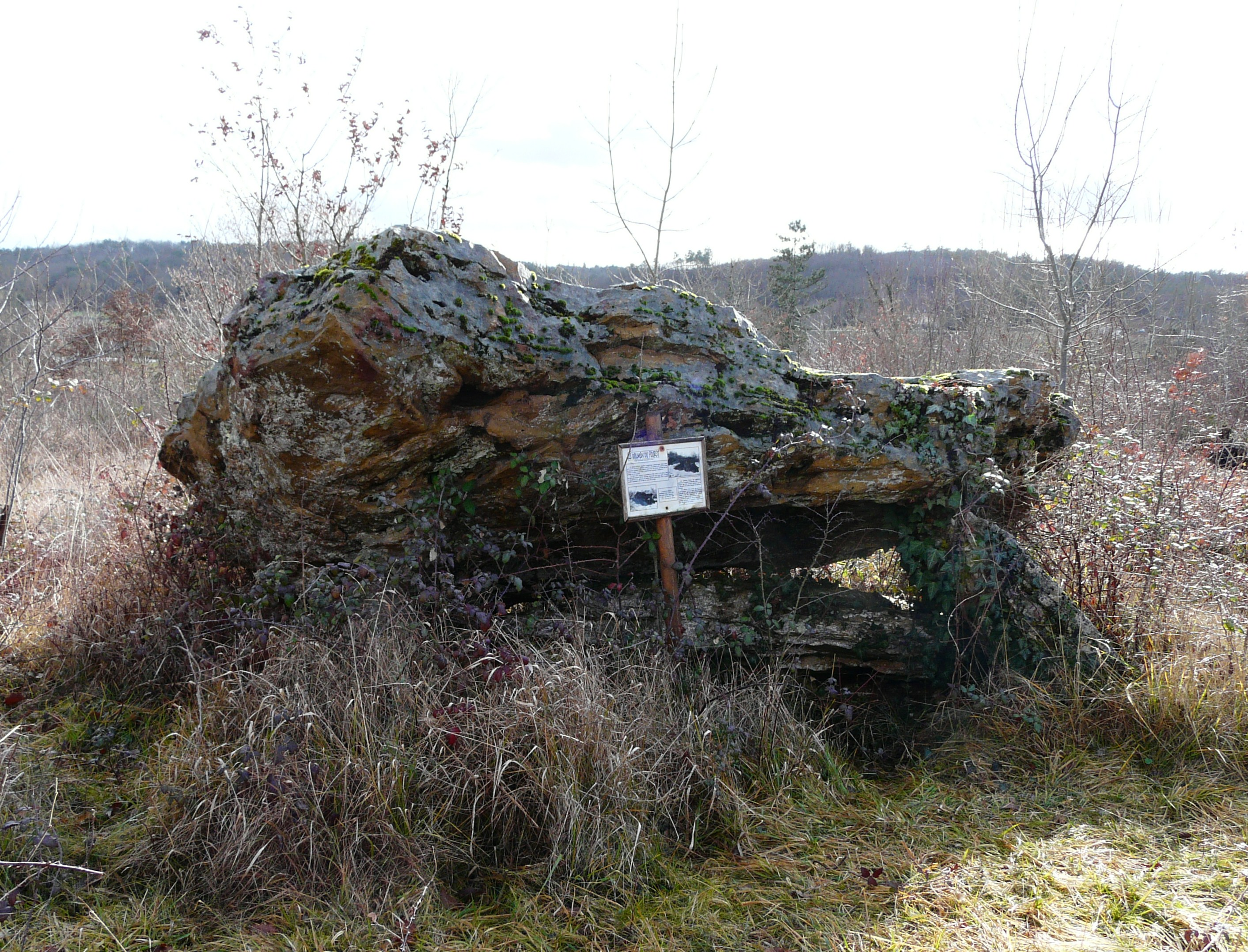 Dolmen de Fouret, Condat-sur-Trincou, Dordogne, France